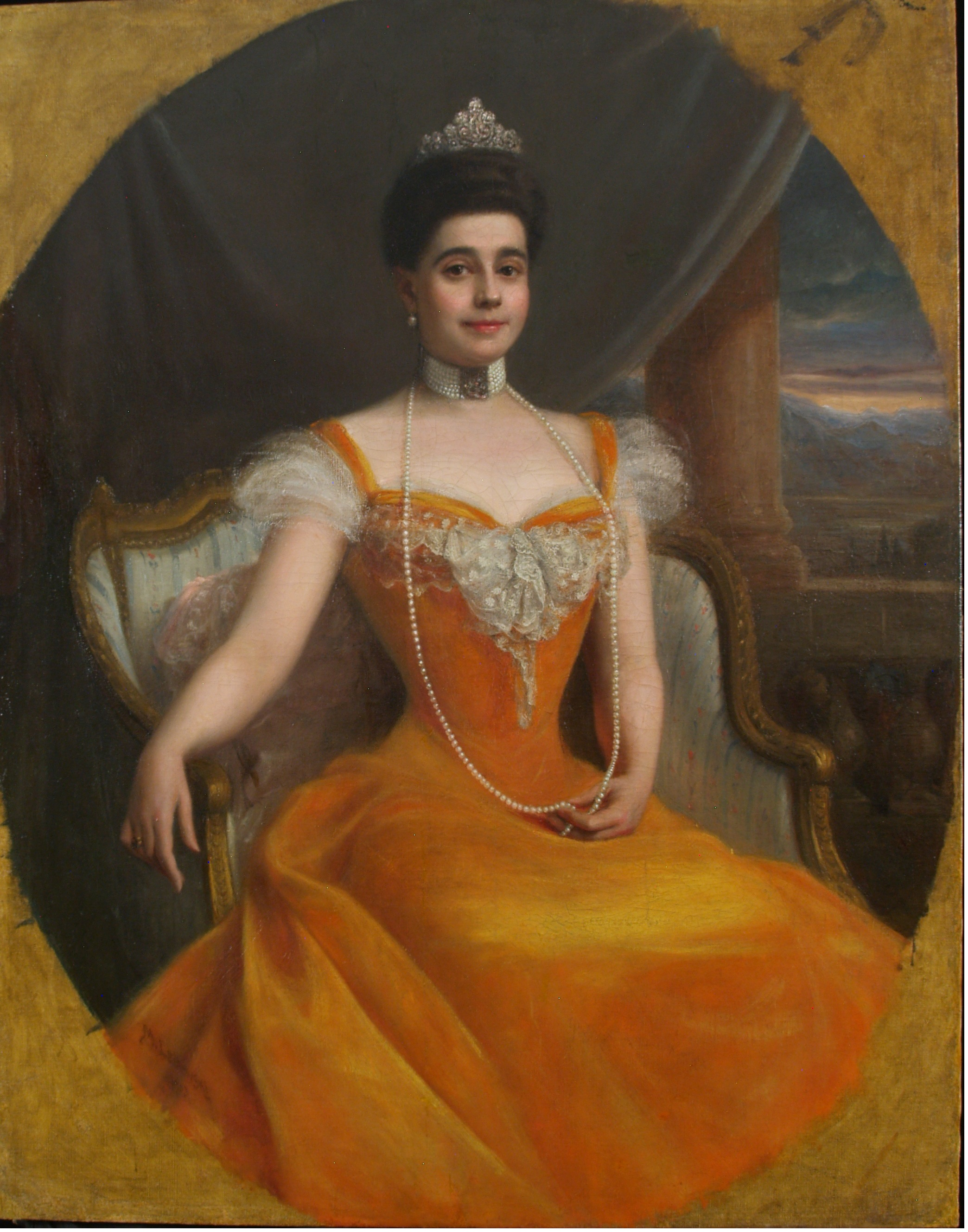 Хелена Потоцька з Радзивіллів. Автор Мойсей Лейбовський. Атрибуція к.і.н. Оксани Лобко. Колекція Вінницького обласного художнього музею.